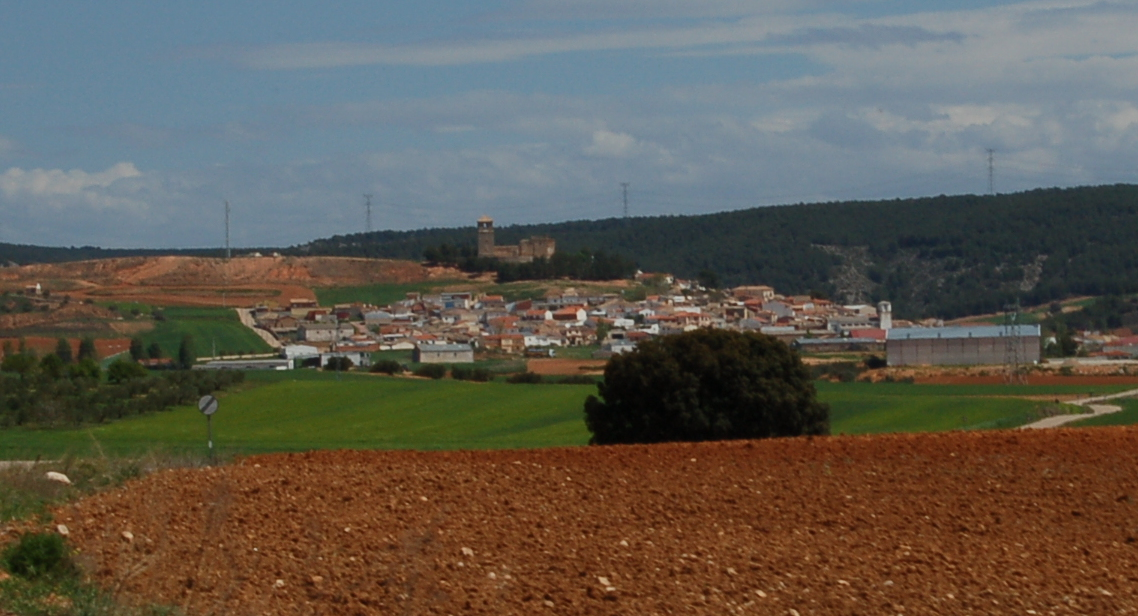 Vista Albaladejo del Cuende